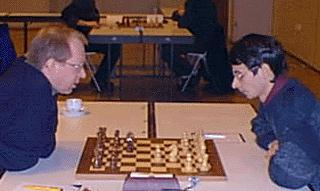 Alexander Nenaschew (Weiß) am 10. Dezember 2000 in Gelsenkirchen, als er gegen Murray Chandler gewann (Deutsche Schachbundesliga 2000/2001).